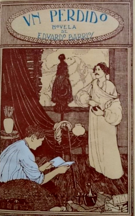 Portada de la primera edición de la novela del escritor chileno Eduardo Barrios Un perdido